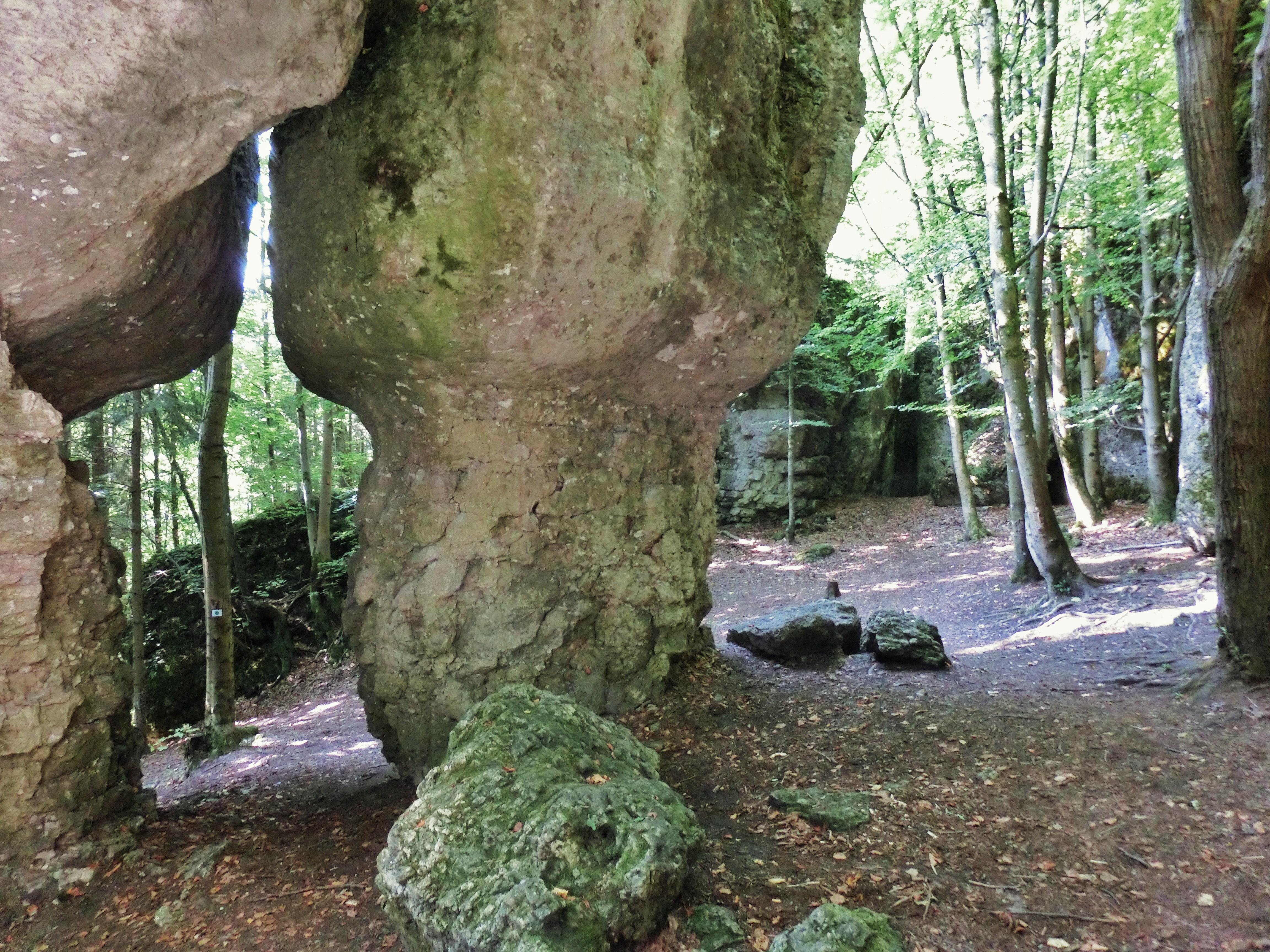 Steinere Stadt 2